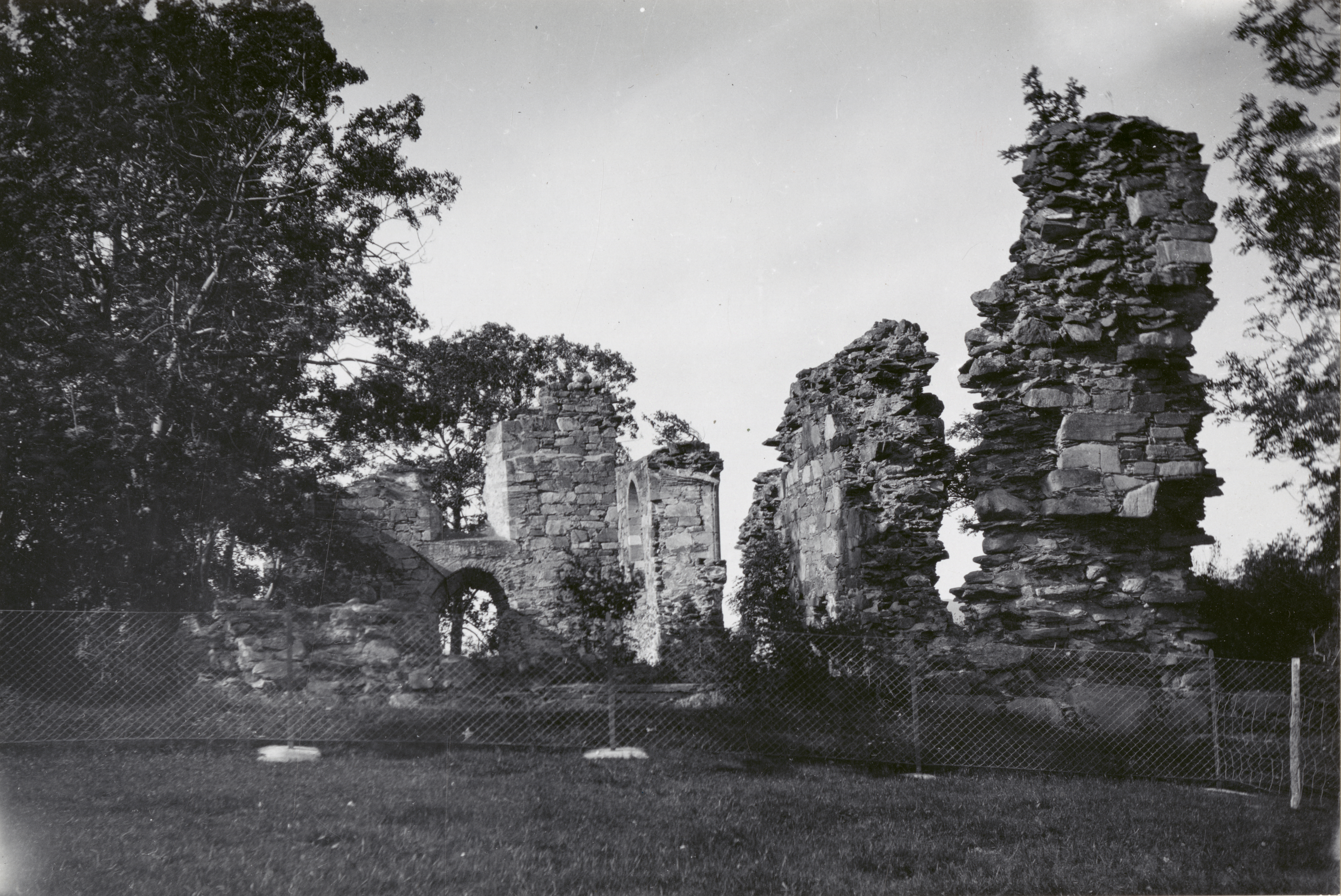 Tautra kloster i Frosta, Nord-Trøndelag This image on crowdsourcing geotagging platform Fotodugnad